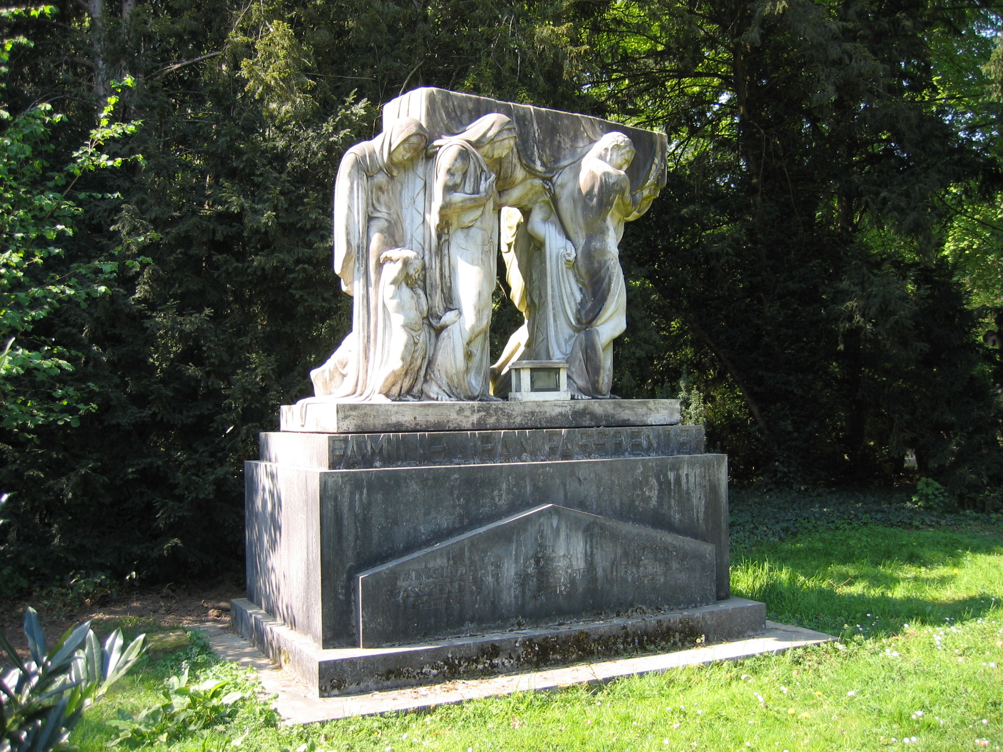 Südfriedhof (Köln)